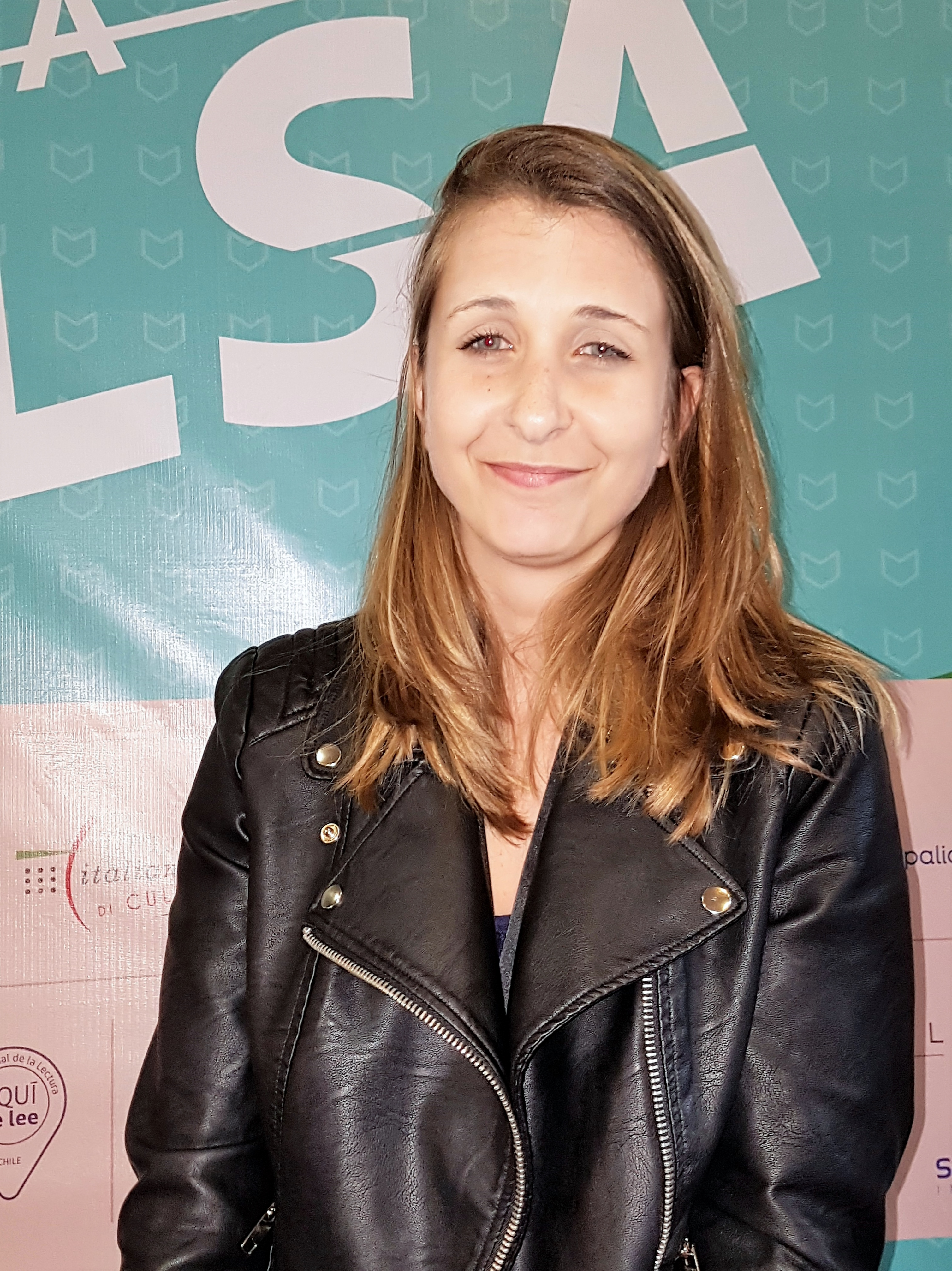 La escritora argentina Luciana Sousa (1986) en la Feria Internacional del Libro de Santiago 2017.